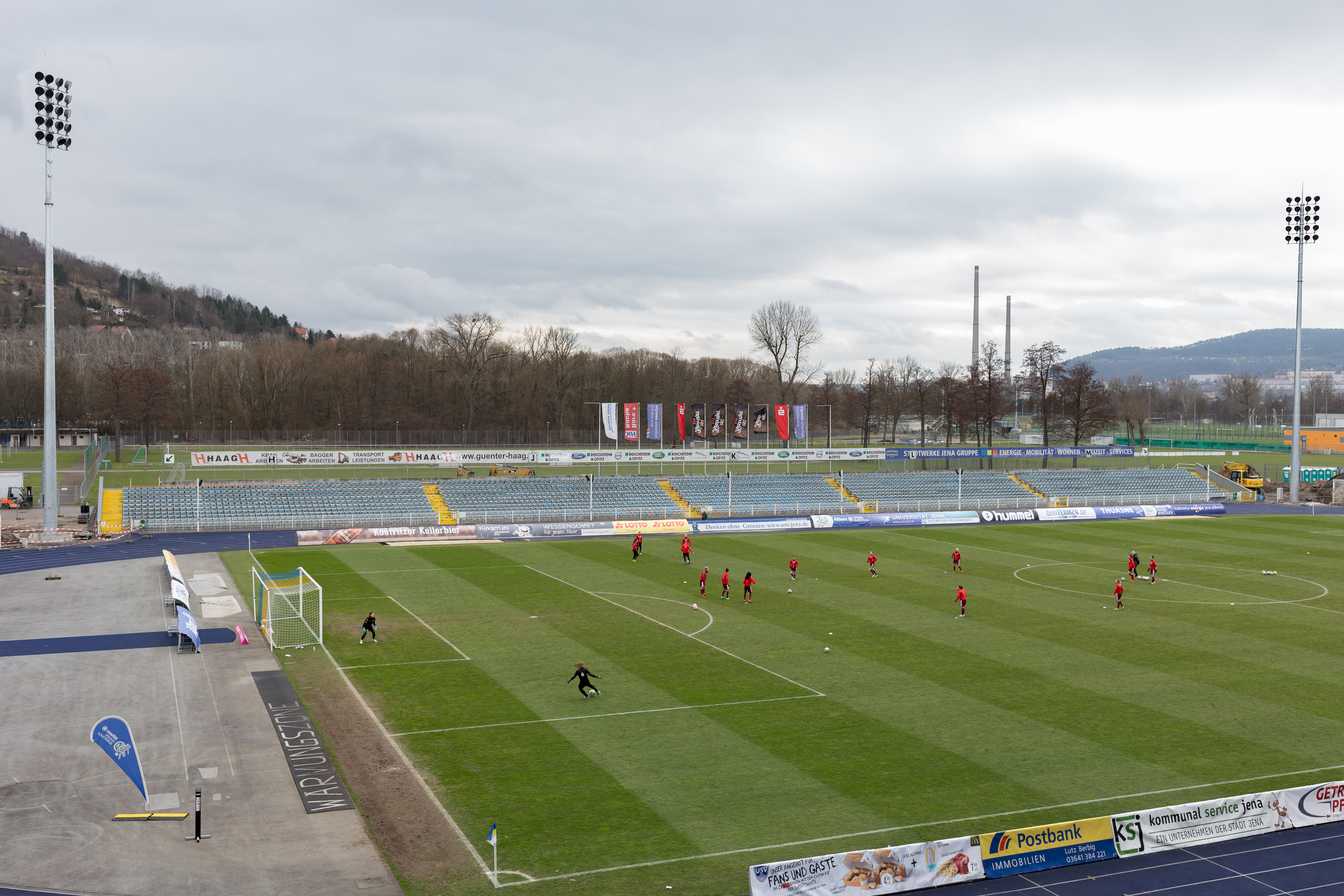 Ernst-Abbe-Sportfeld mit neuen LED-Flutlichtmasten